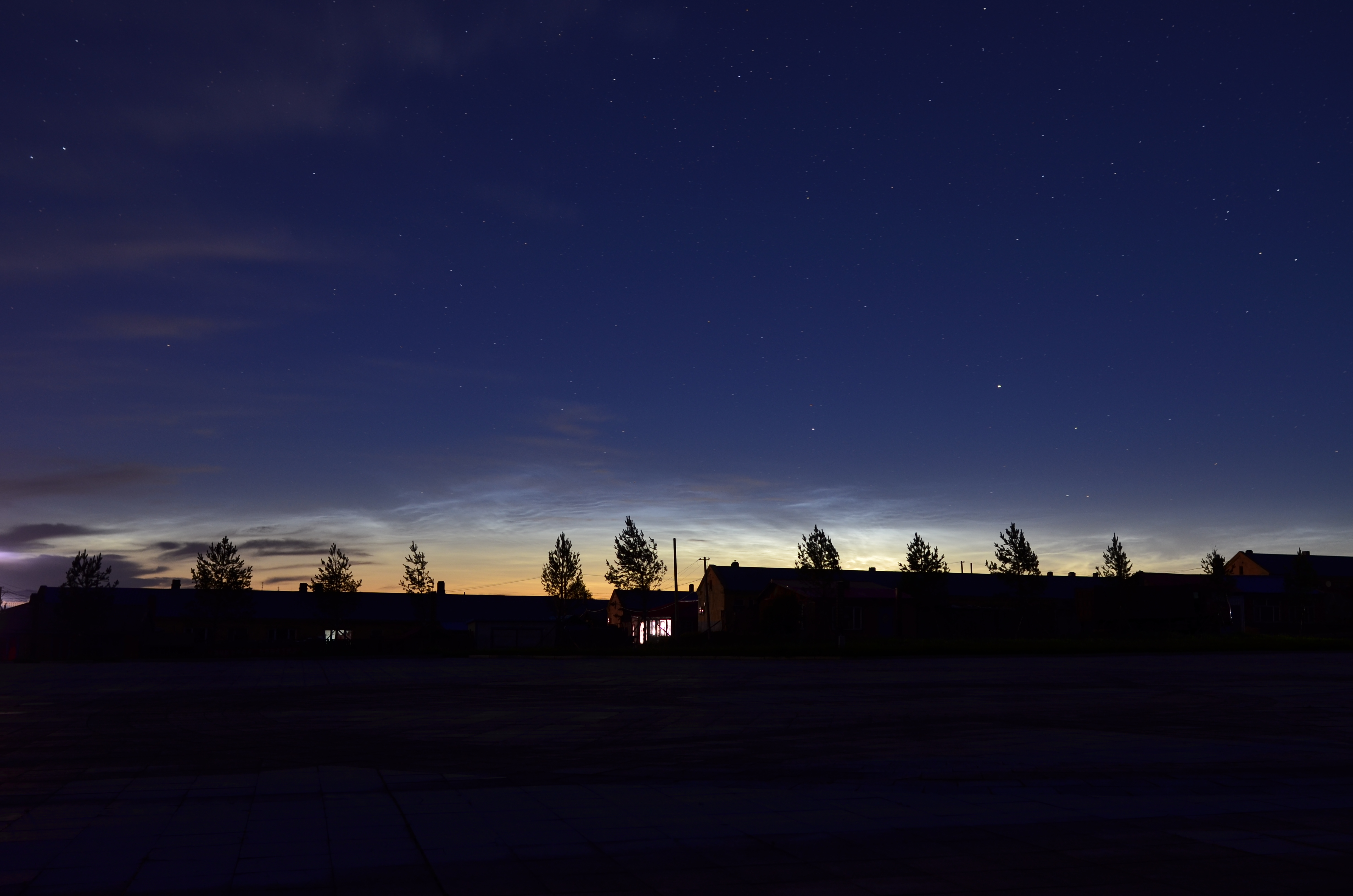 夏至午夜拍摄的夜光云，中国大兴安岭地区漠河县北极星广场，2018年6月22日